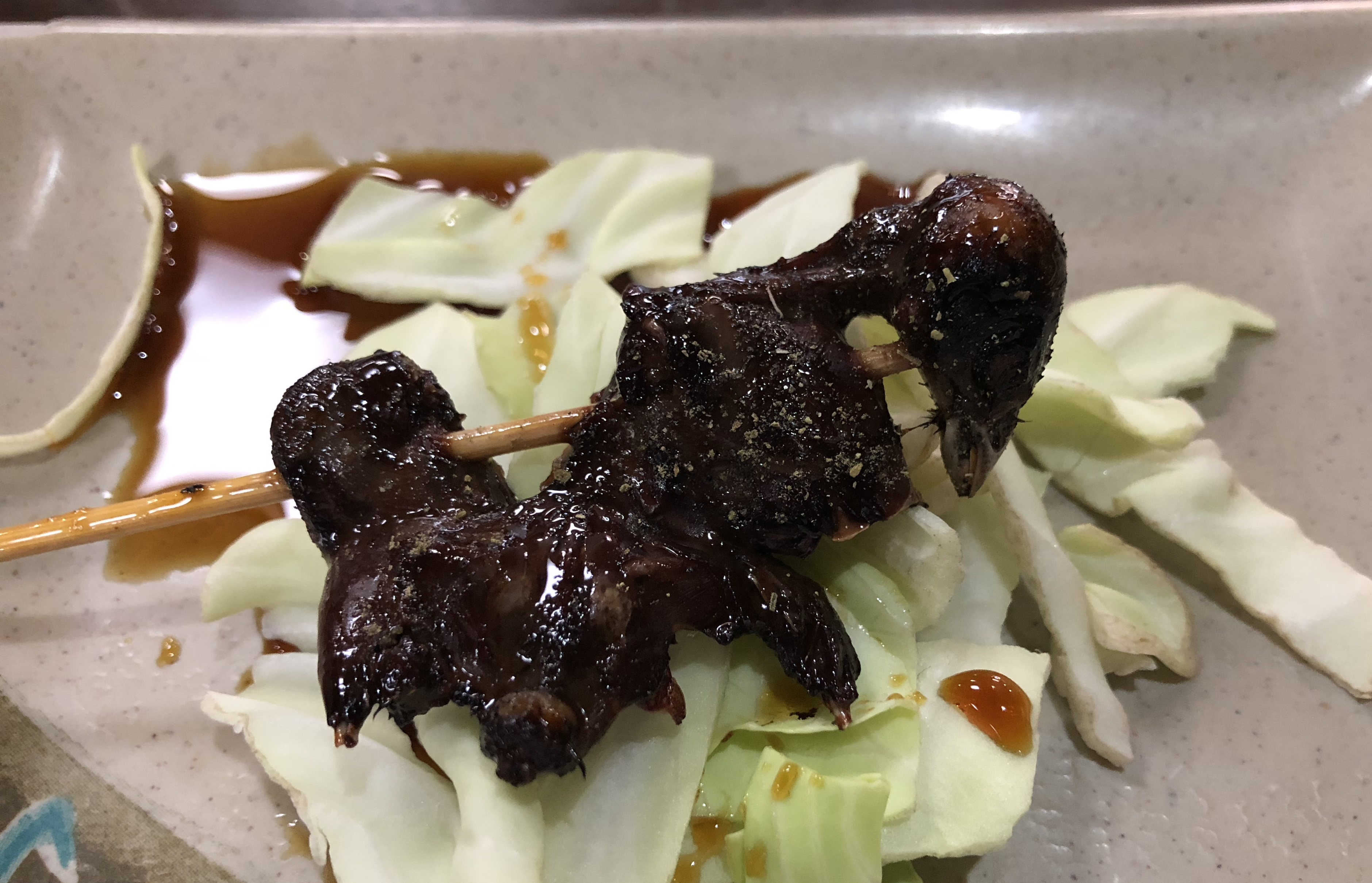 スズメのja:焼き鳥。伏見稲荷大社参道の日野屋にて。